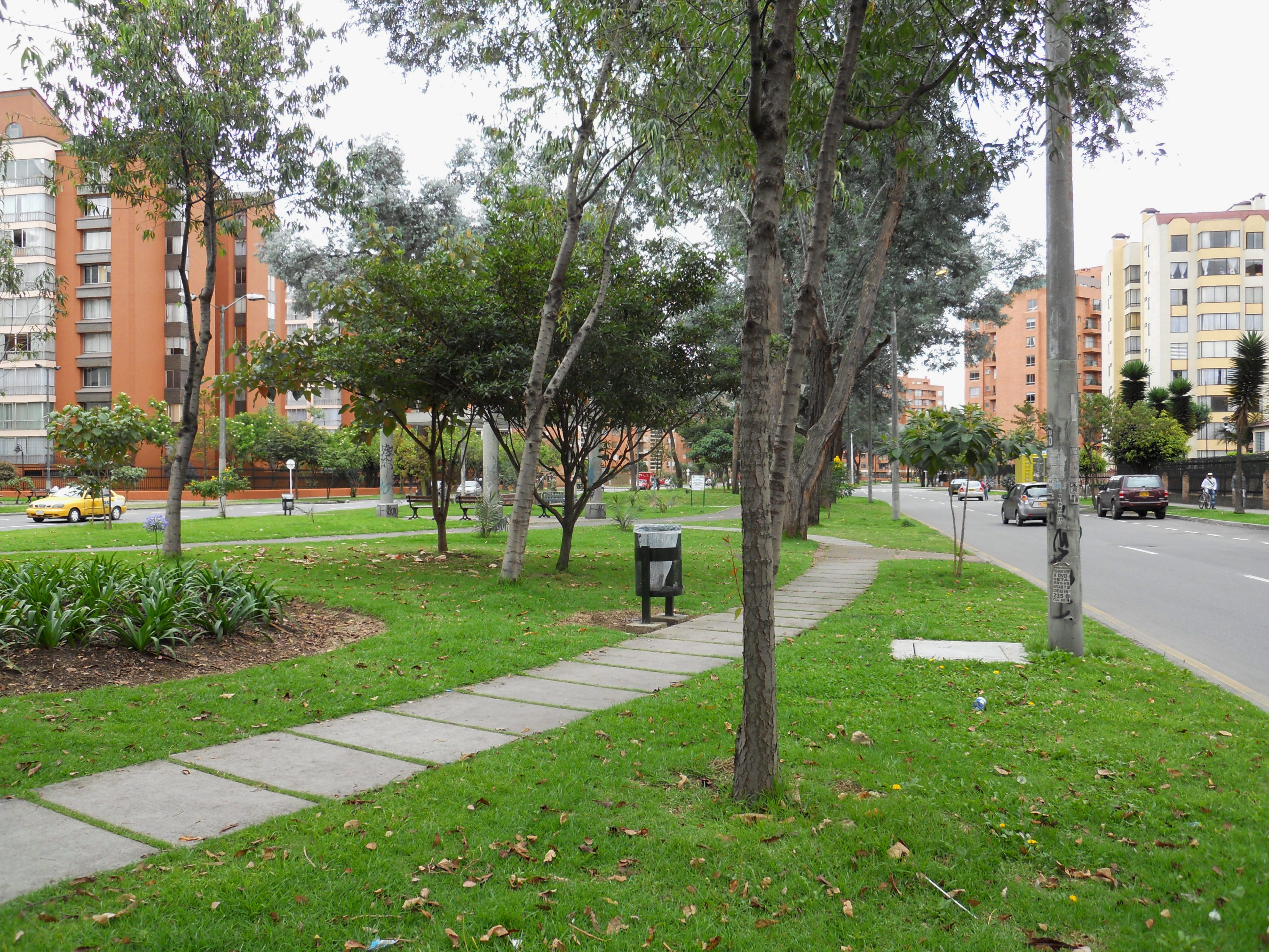 Zona verde en la calle 25 con carrera 68 C en Ciudad Salitre.